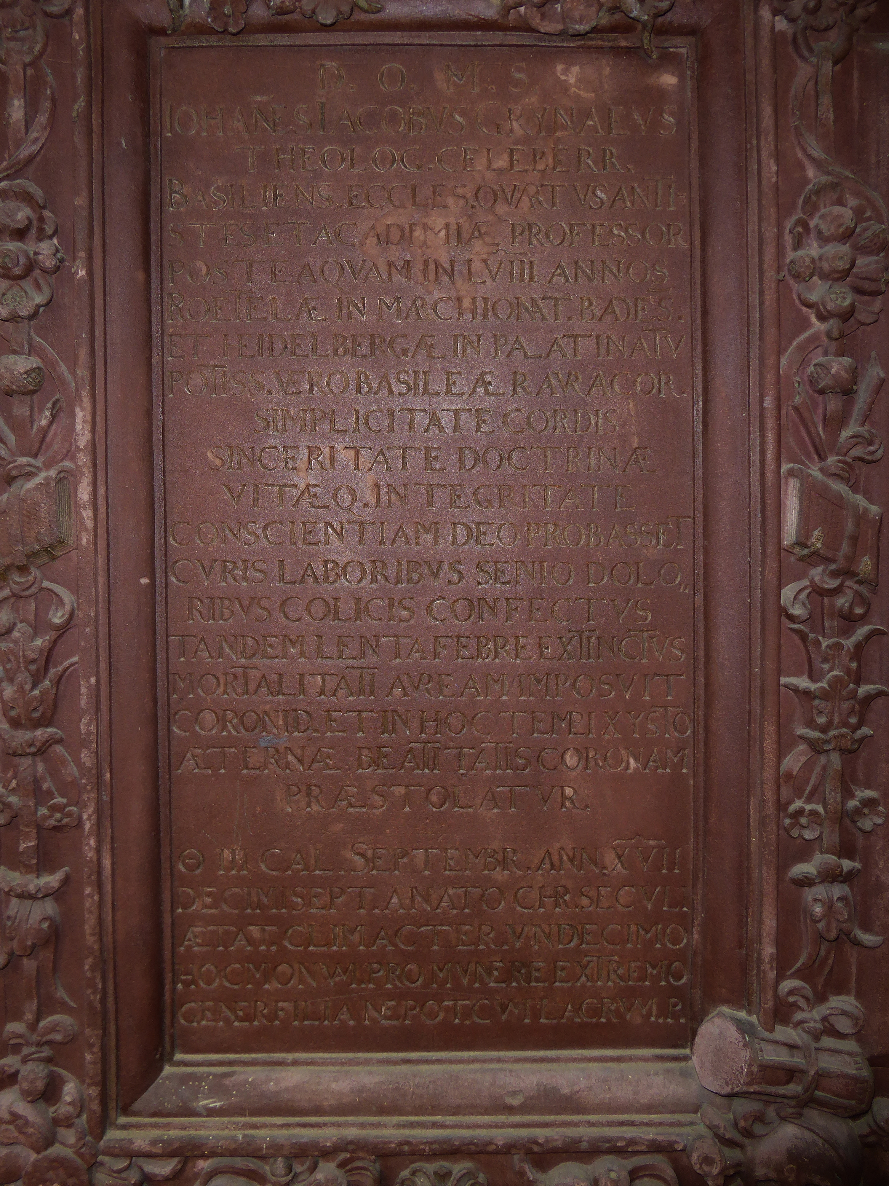 Johann Jakob Grynaeus (1540–1617) Theologe, Antistes am Basler Münster. Epitaphien (Grabtafeln) im gotische Doppelkreuzgang (15. Jh.) des Basler Münster.